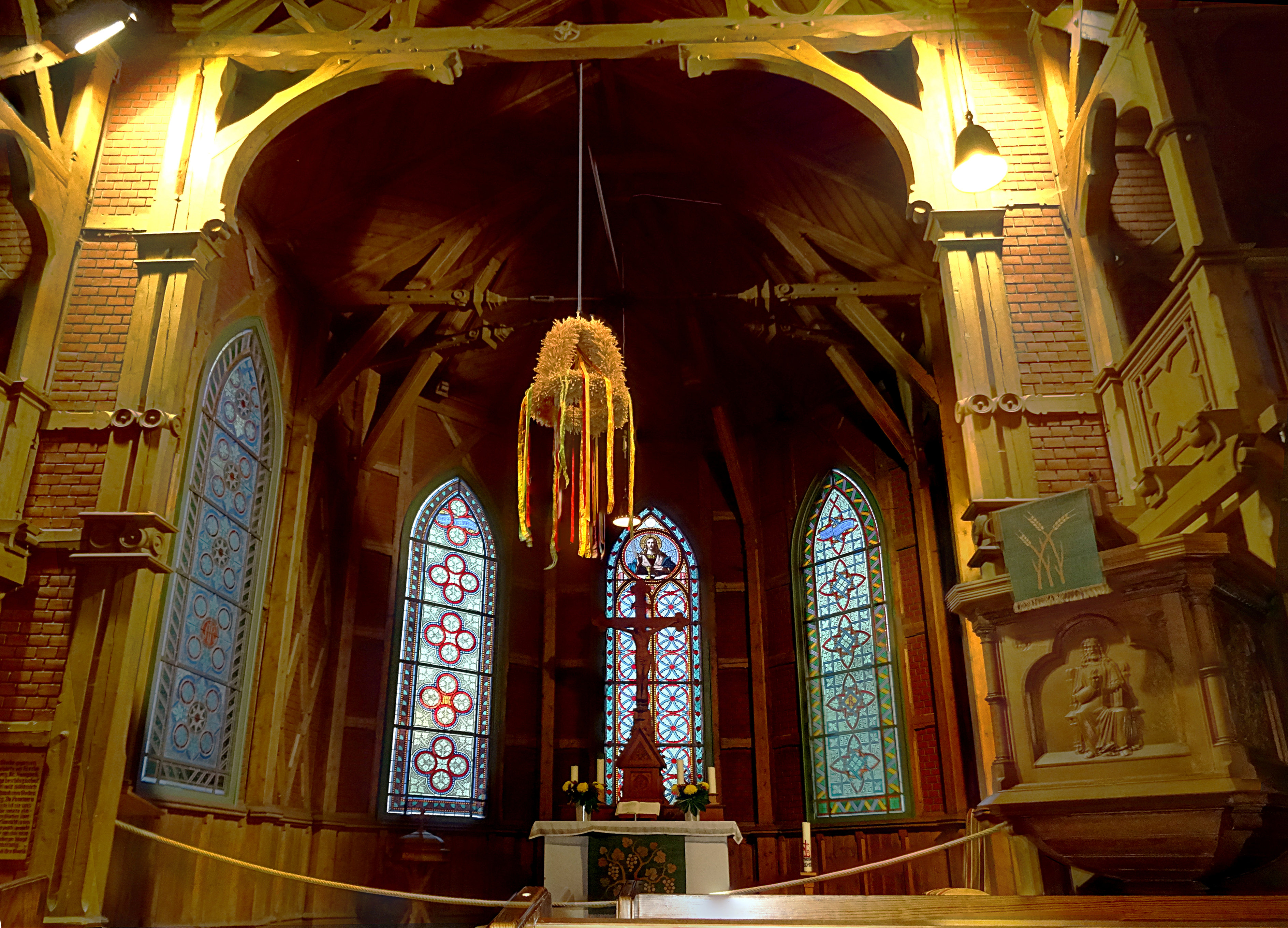 Altarraum der Trinitatiskirche Braunlage